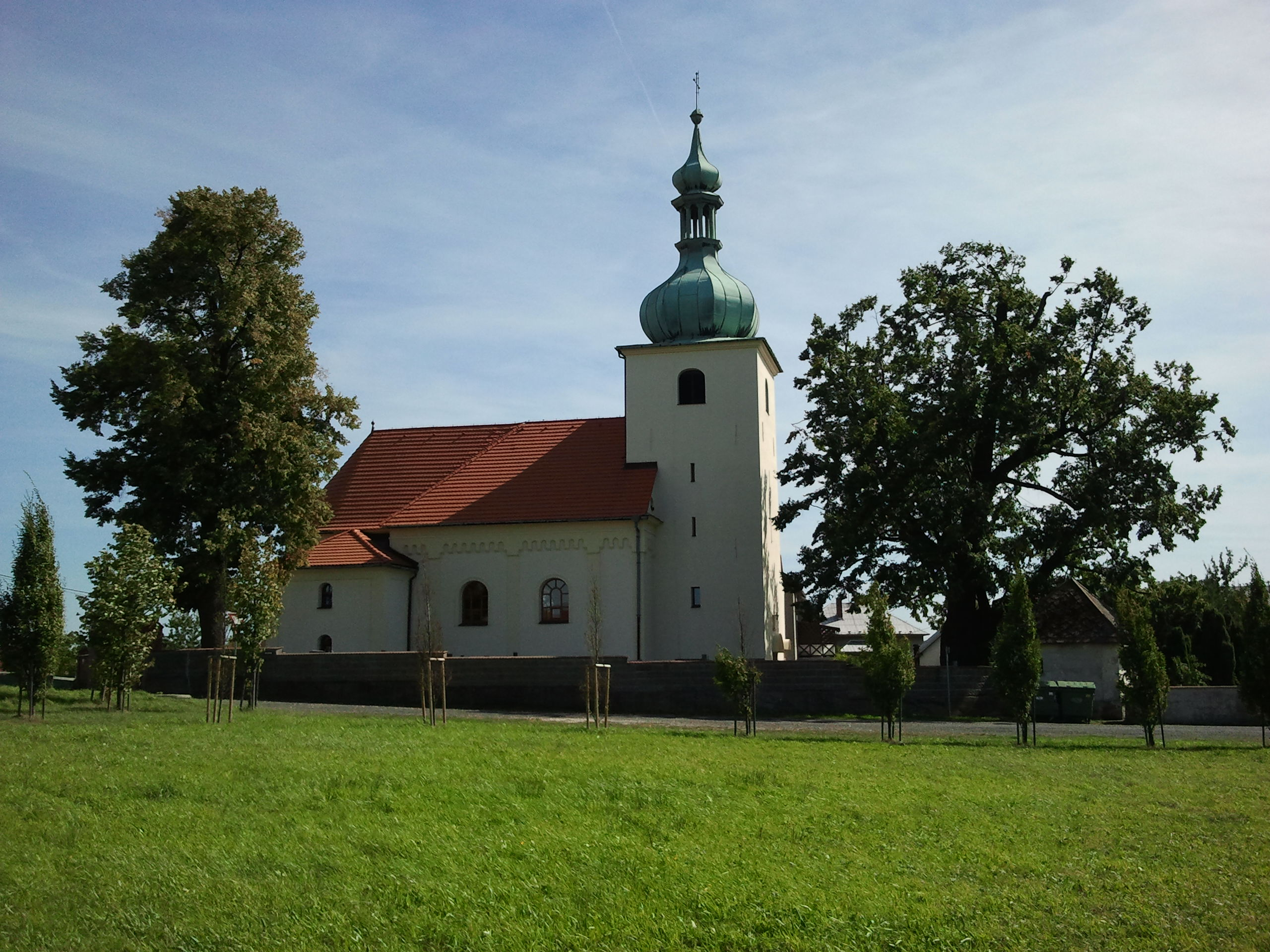 Kostel sv. Bartoloměje (Olbramice), V okraj obce, Olbramice